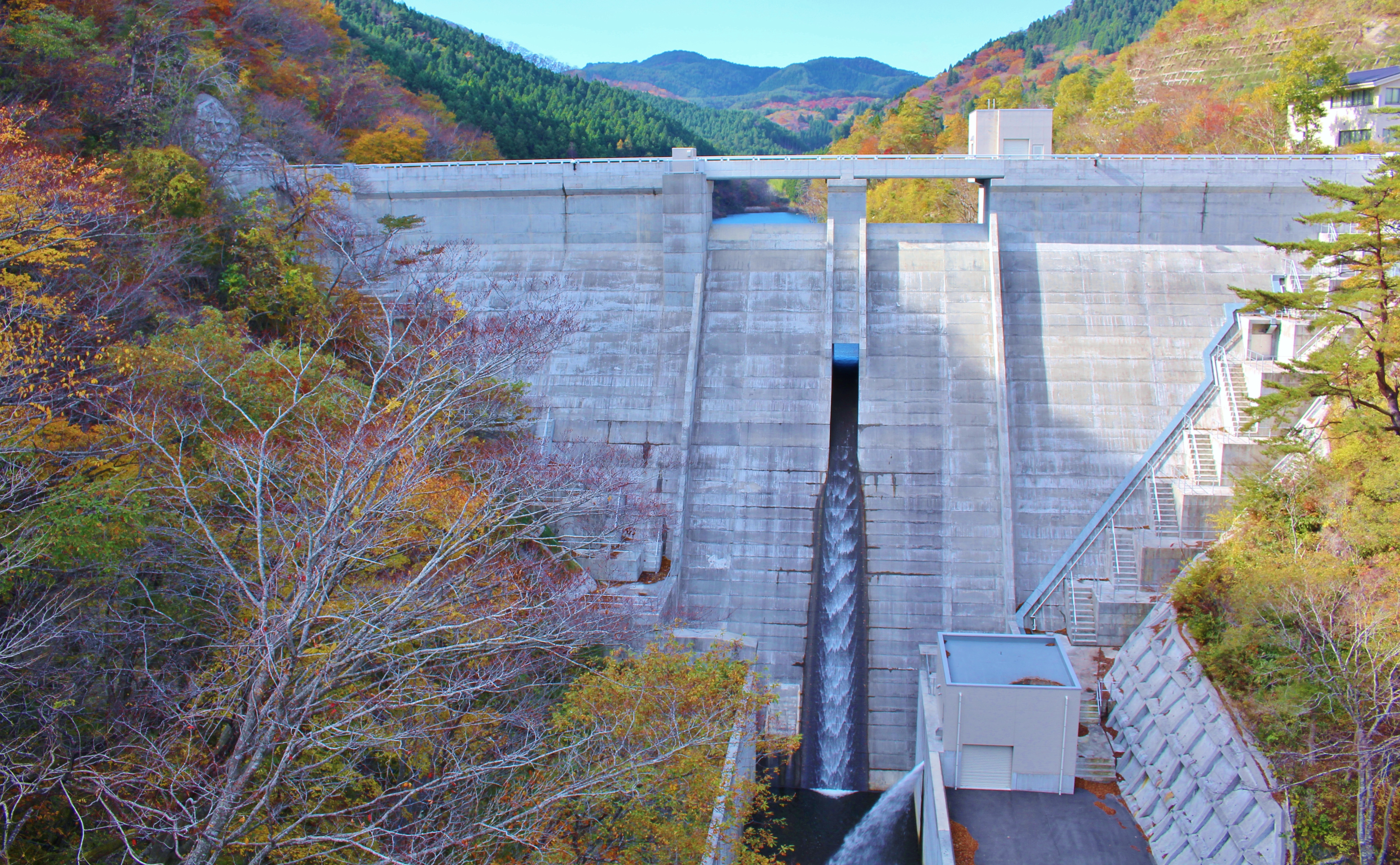 南三陸町 払川ダム